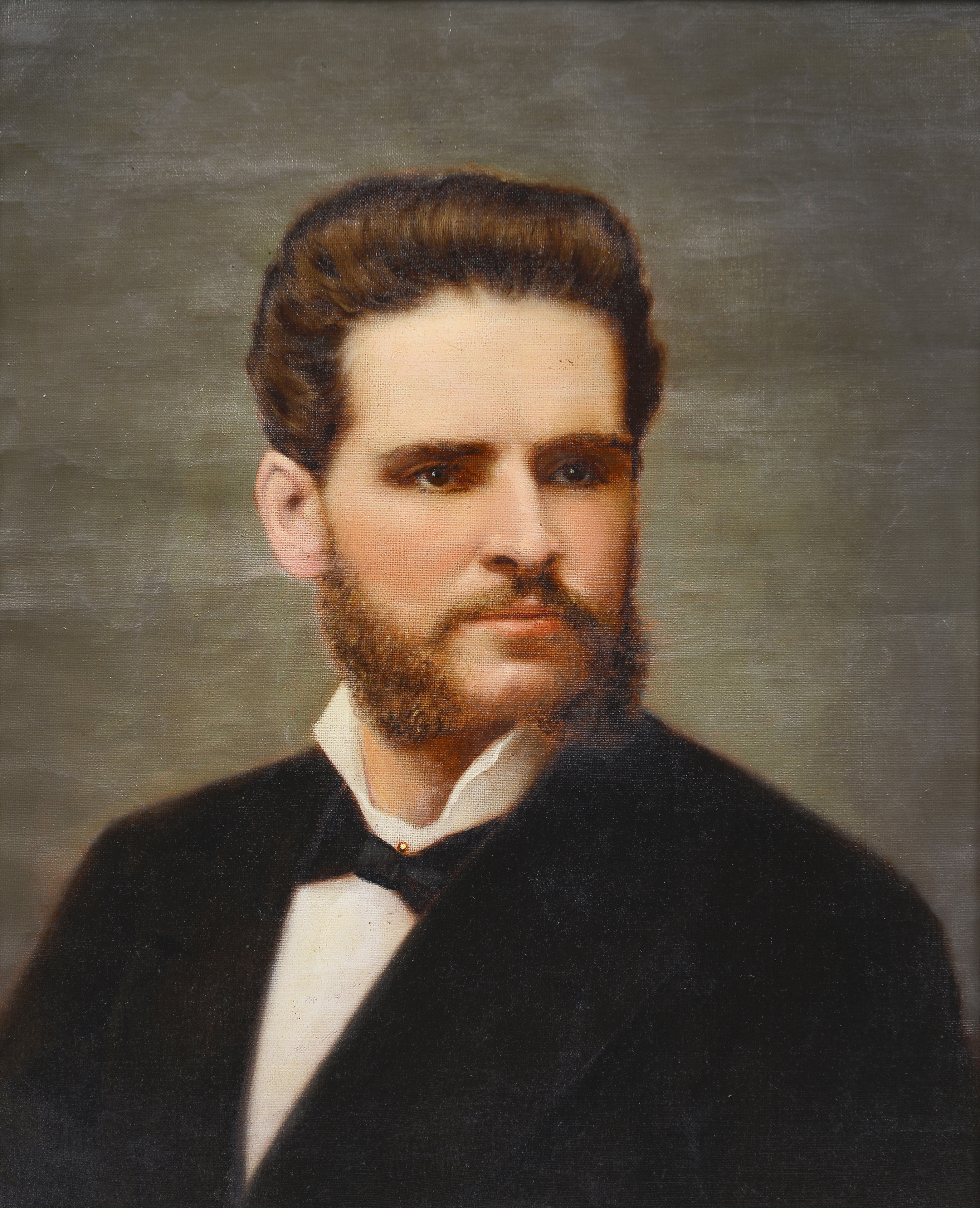 Pedro José Domingo de Guerra, presidente de Bolivia durante la guerra del Pacífico